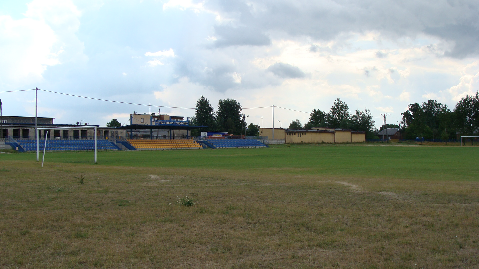 Stadion Trzech Koron Żarnowiec